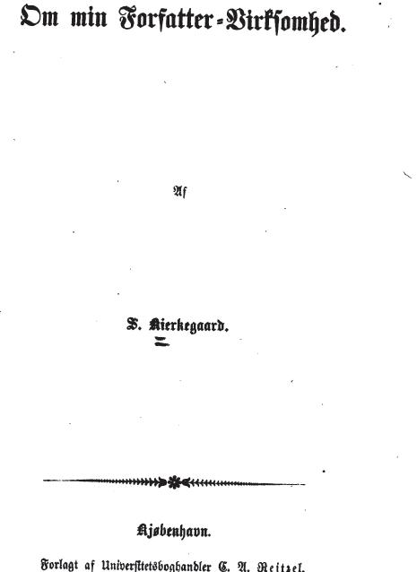 Imagen a la primera edicion 1847